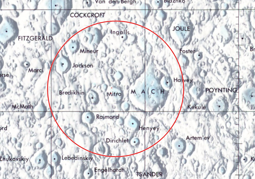 Detalle de la imagen Moonmap from Moon Map - Equatorial region 45S to 45N - LPC1 - NASA de la Cuenca Dirichlet-Jackson